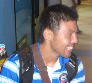 Kazuto Kushida